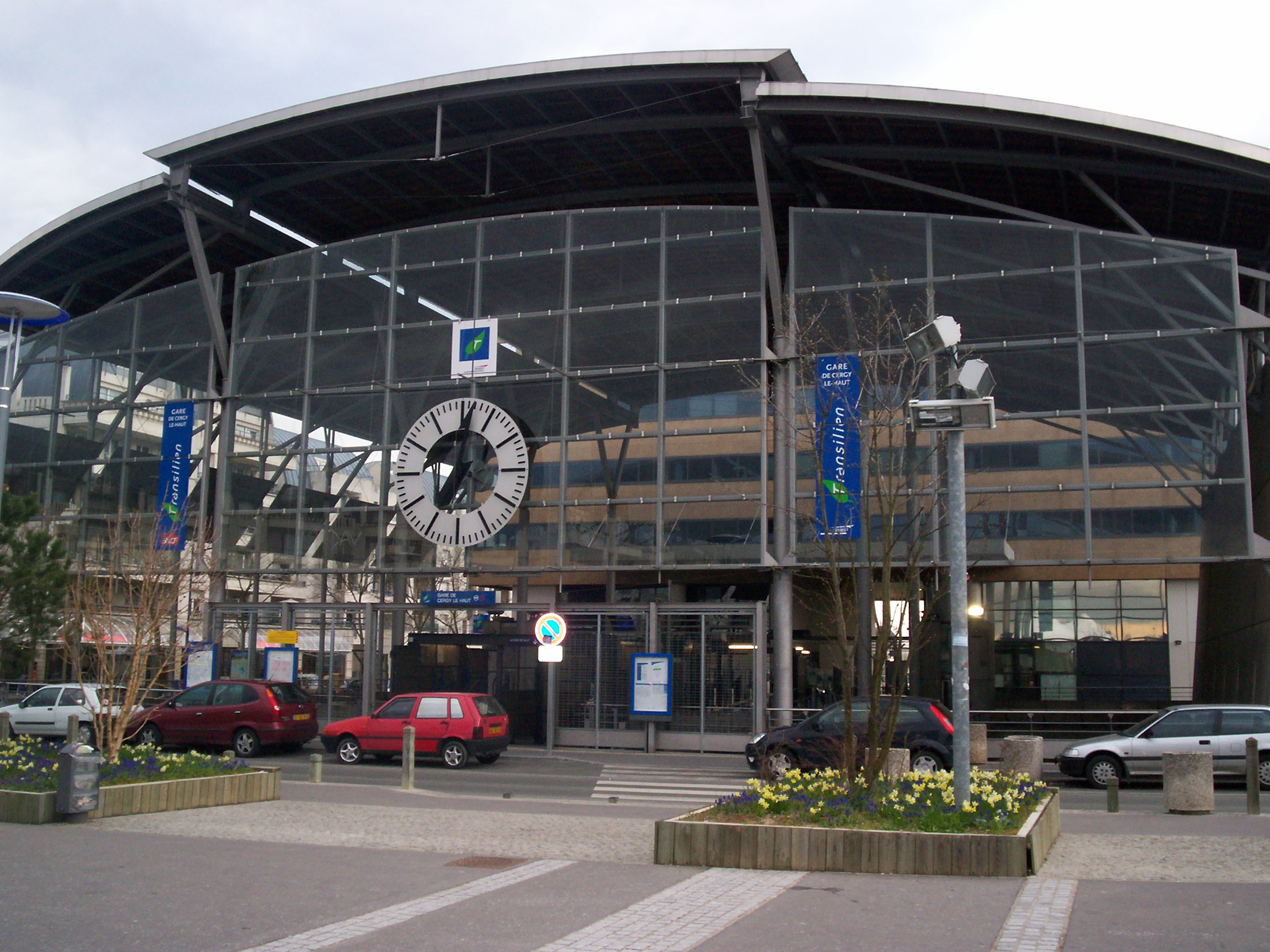 Gare de Cergy Le Haut